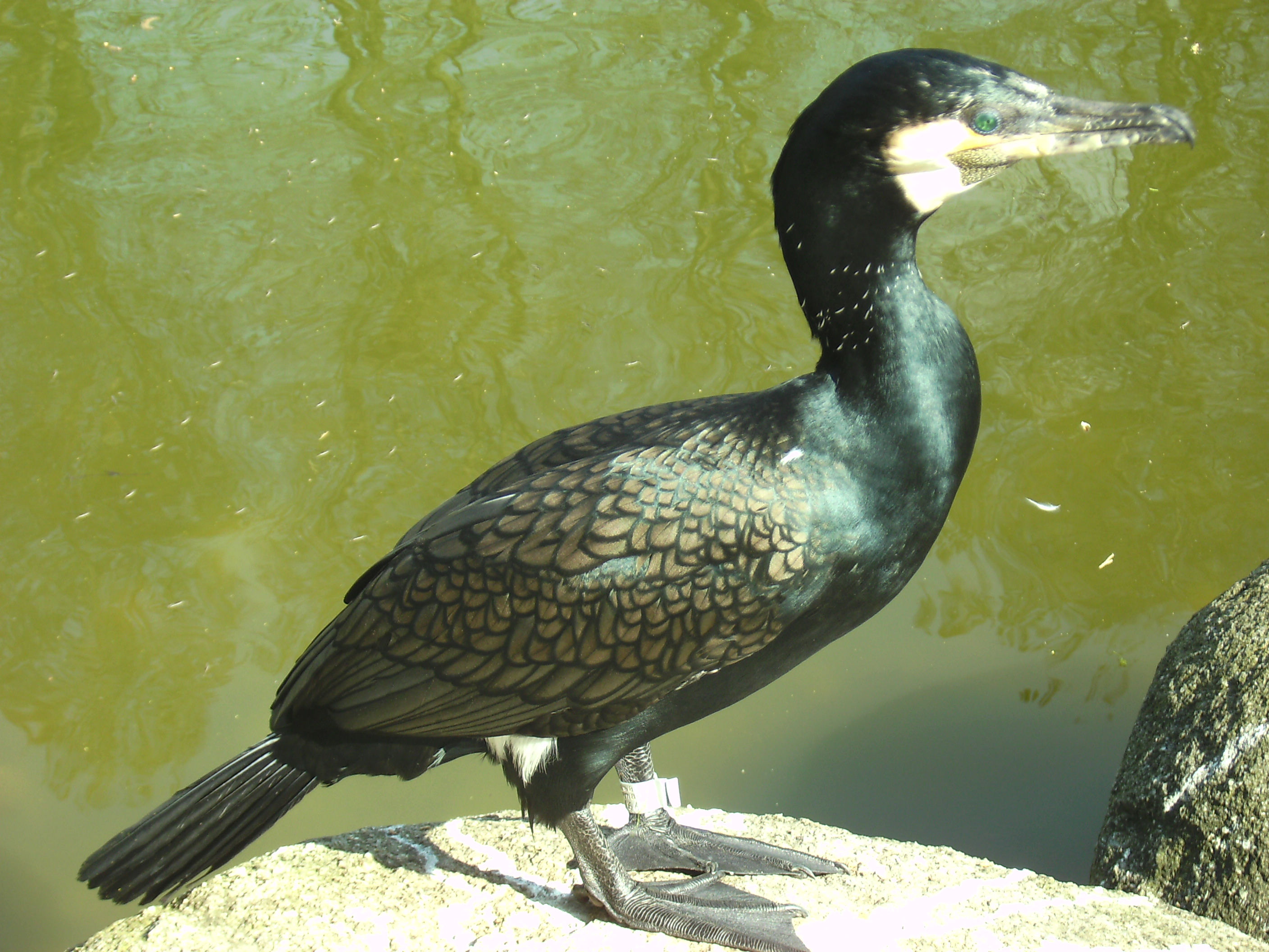 Kormoran: Gefiederstruktur (Mannheim, Luisengarten)